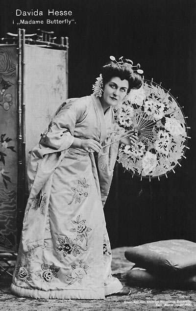 Davida Hesse i Madame Butterfly